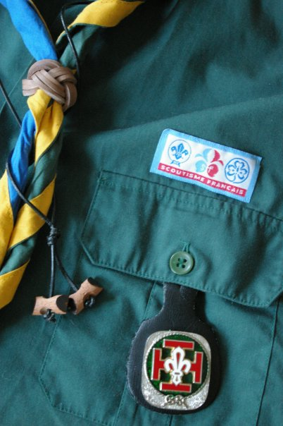 Foulard, buchettes et engagement Scouts de France